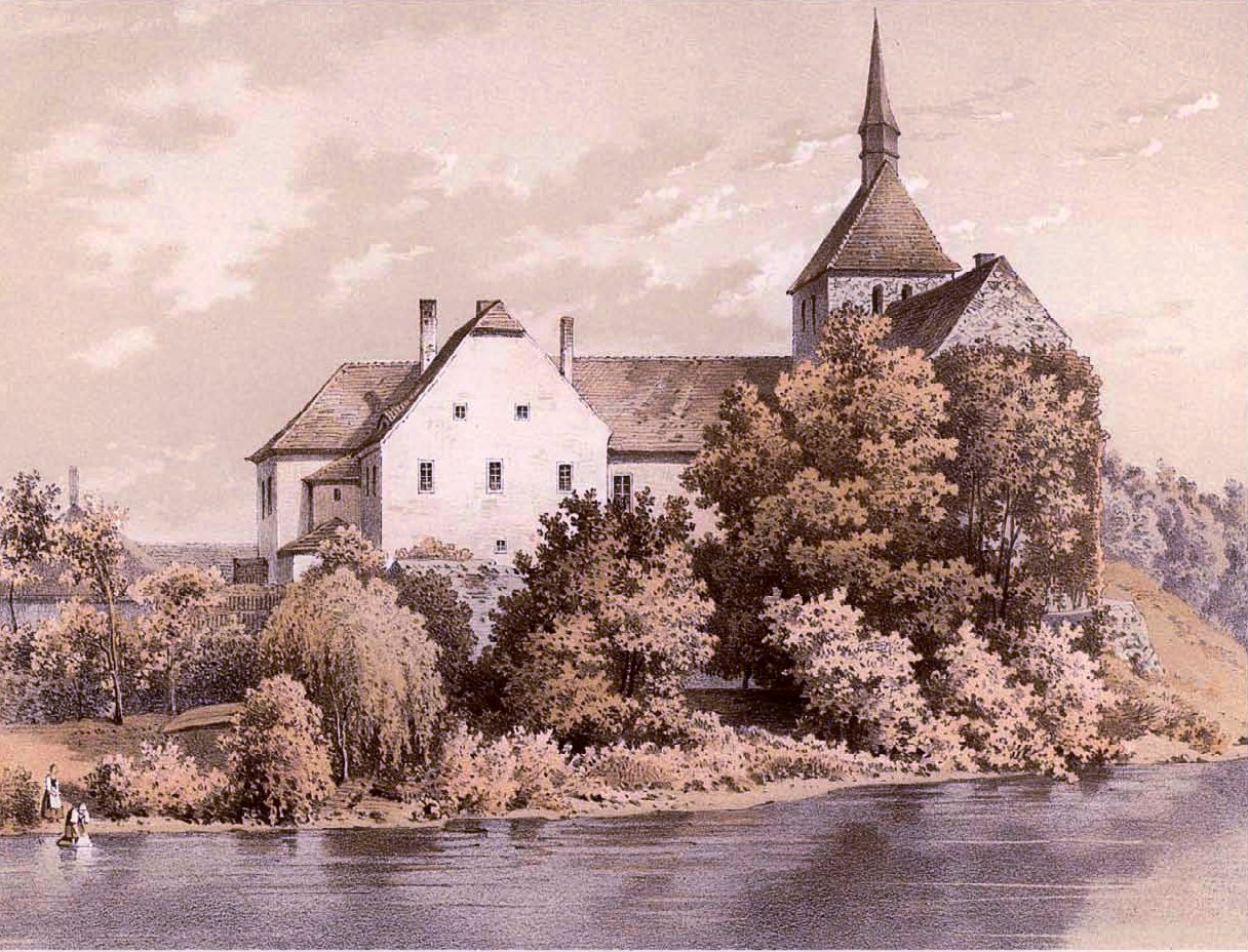 Rittergut Muldenstein, Kreis Bitterfeld, Provinz Sachsen